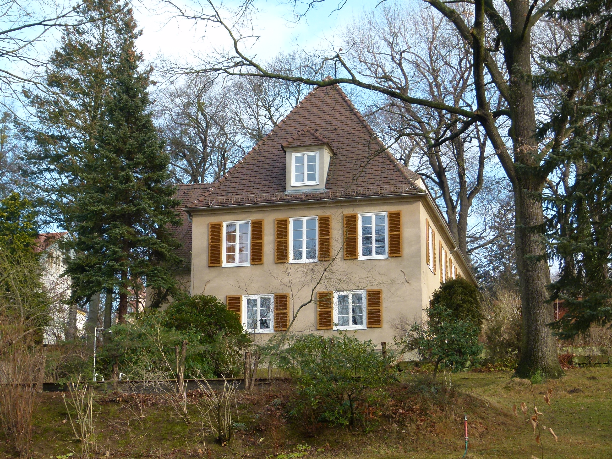 Denkmalgeschütztes Haus, Knoopstraße 6, Loschwitz, Dresden